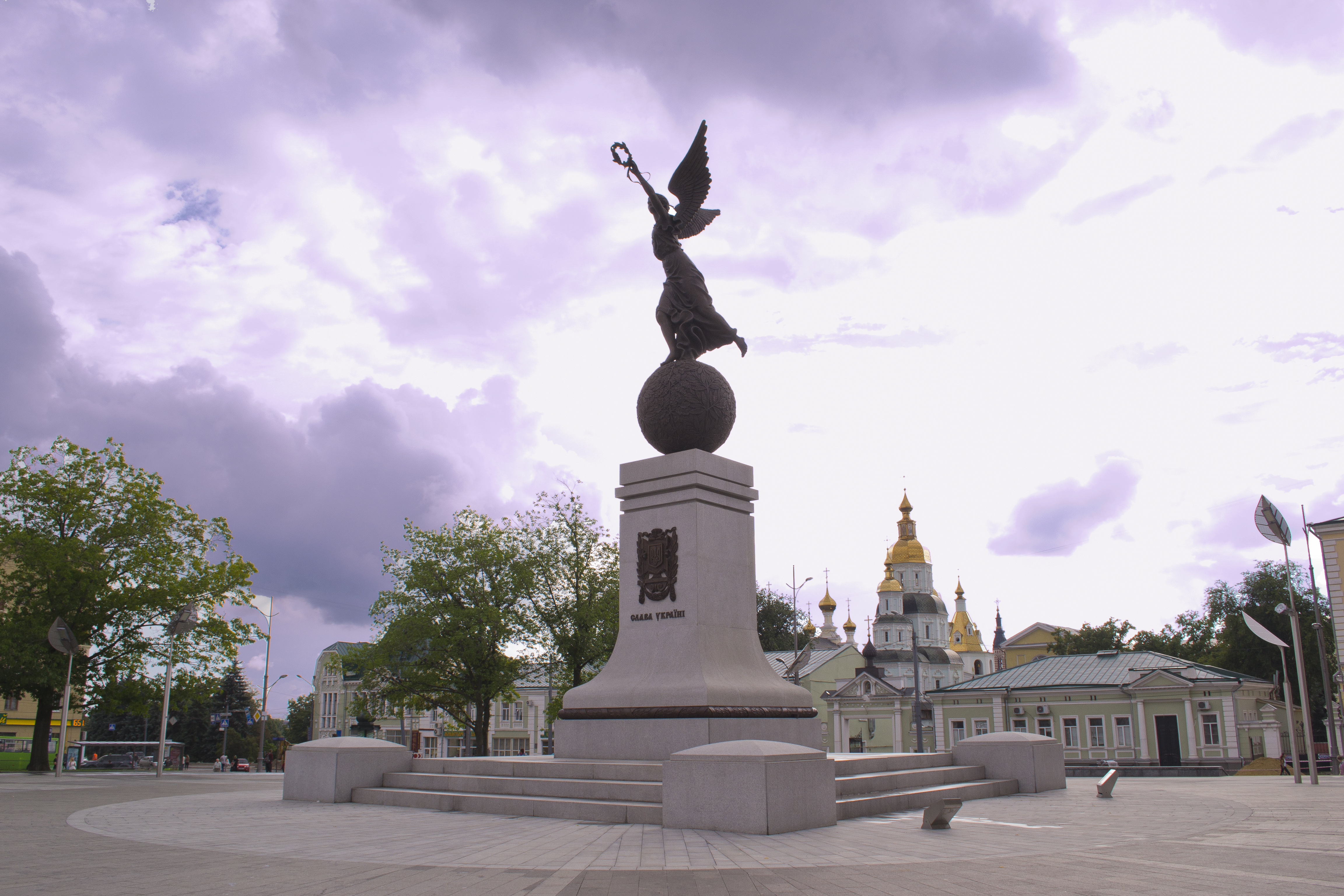 Місто Харків. Вулиця Сумська.